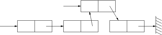 Troisième étape de l'ajout d'un élément dans une liste chaînée. Dessin réalisé sous xfig par moi même. Licensing Catégorie:Schémas